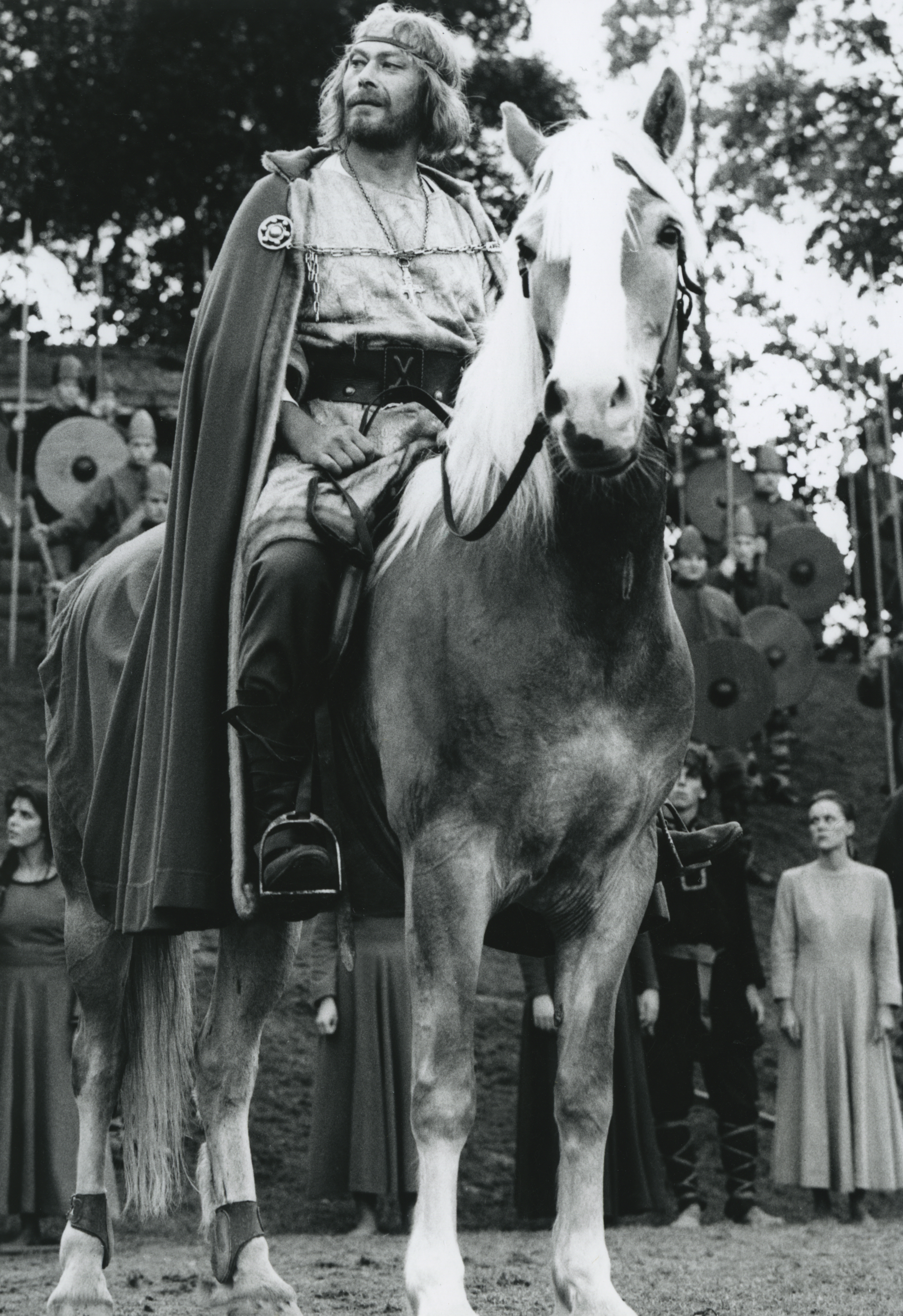 Norwegian actor Nils Ole Oftebro as king Olaf II of Norway in the The Saint Olav Drama at Stiklestad 1992.